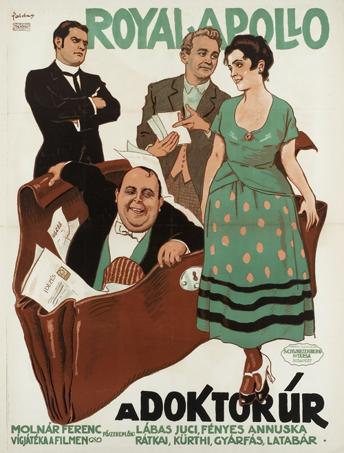 Plakat von Imre Földes zum Film A Doktor Úr, 1916. Regie: Mihály Kertész (Michael Curtiz) mit Juci Lábas nach einem Lustspiel von Ferenc Molnár. Uraufführung in Budapest, Royal Apollo Kino